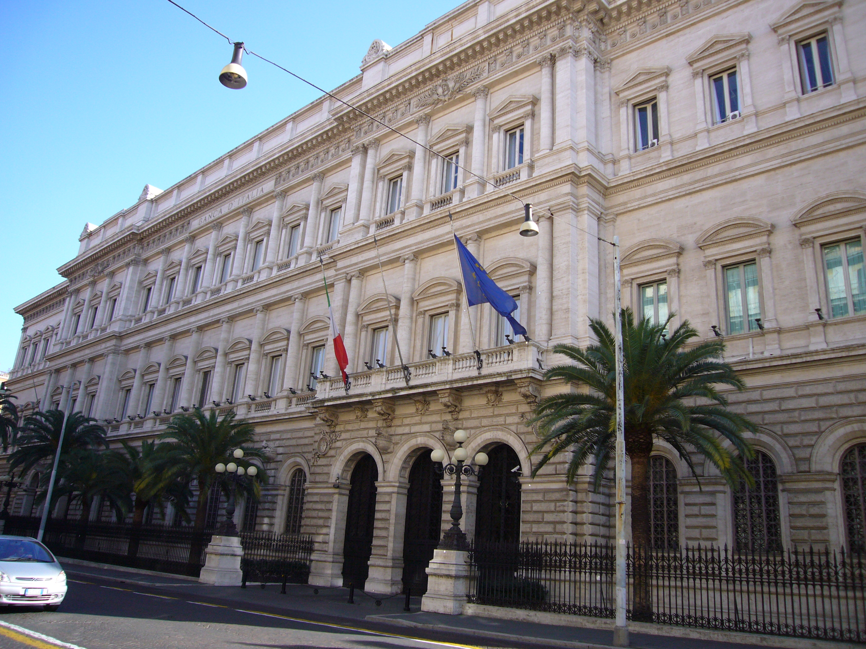 Roma, via Nazionale: Palazzo Koch, sede di rappresentanza della Banca d'Italia